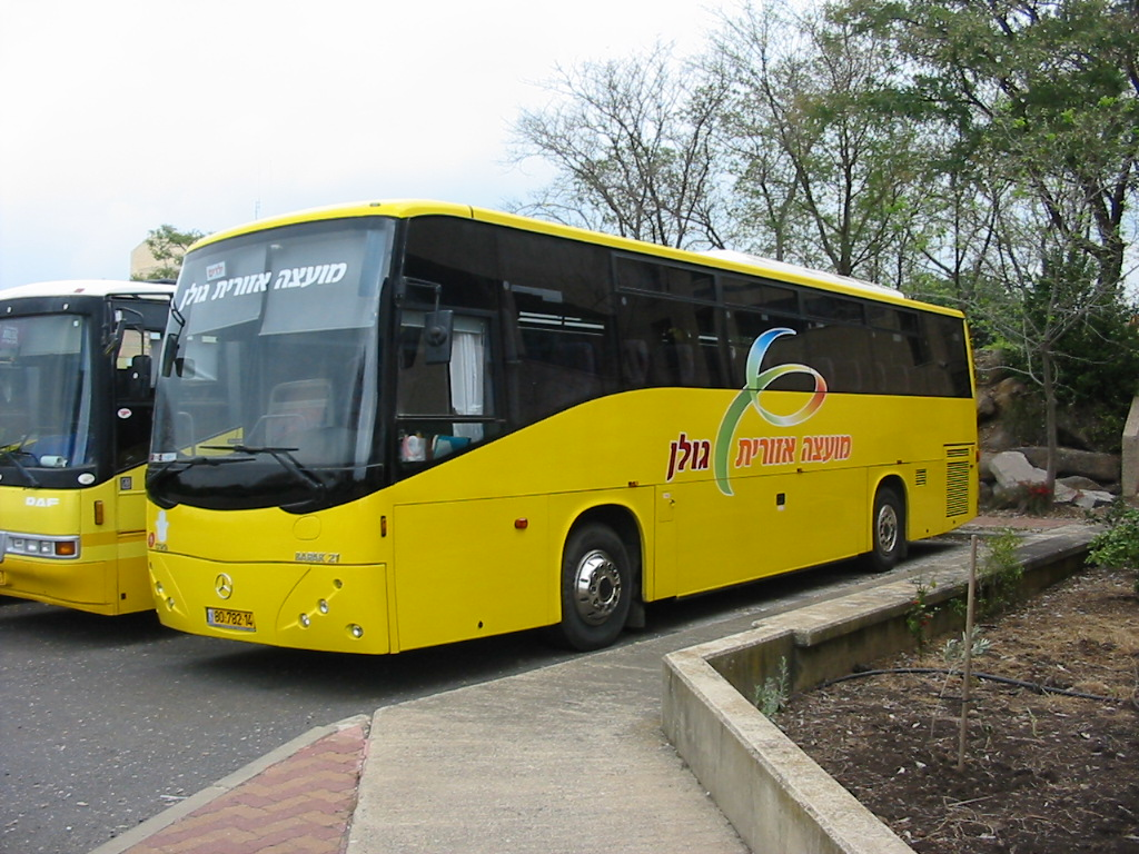 אוטובוסים צהובים של המועצה האזורית גולן חונים בבניין המועצה בקצרין.